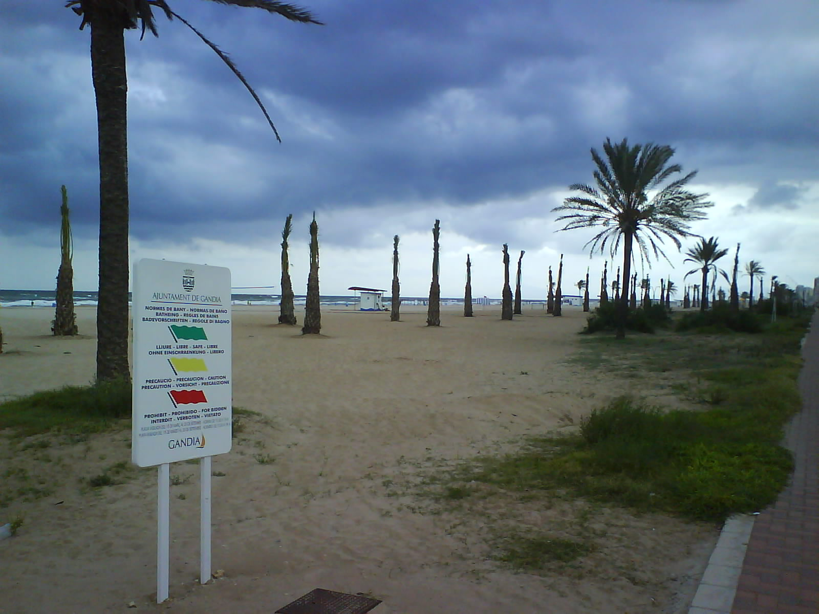 Playa de Gandía, en Valencia (España)